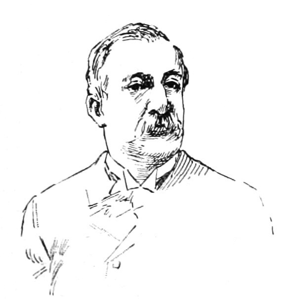 "La Nouvelle Chambre" : "Ferry".